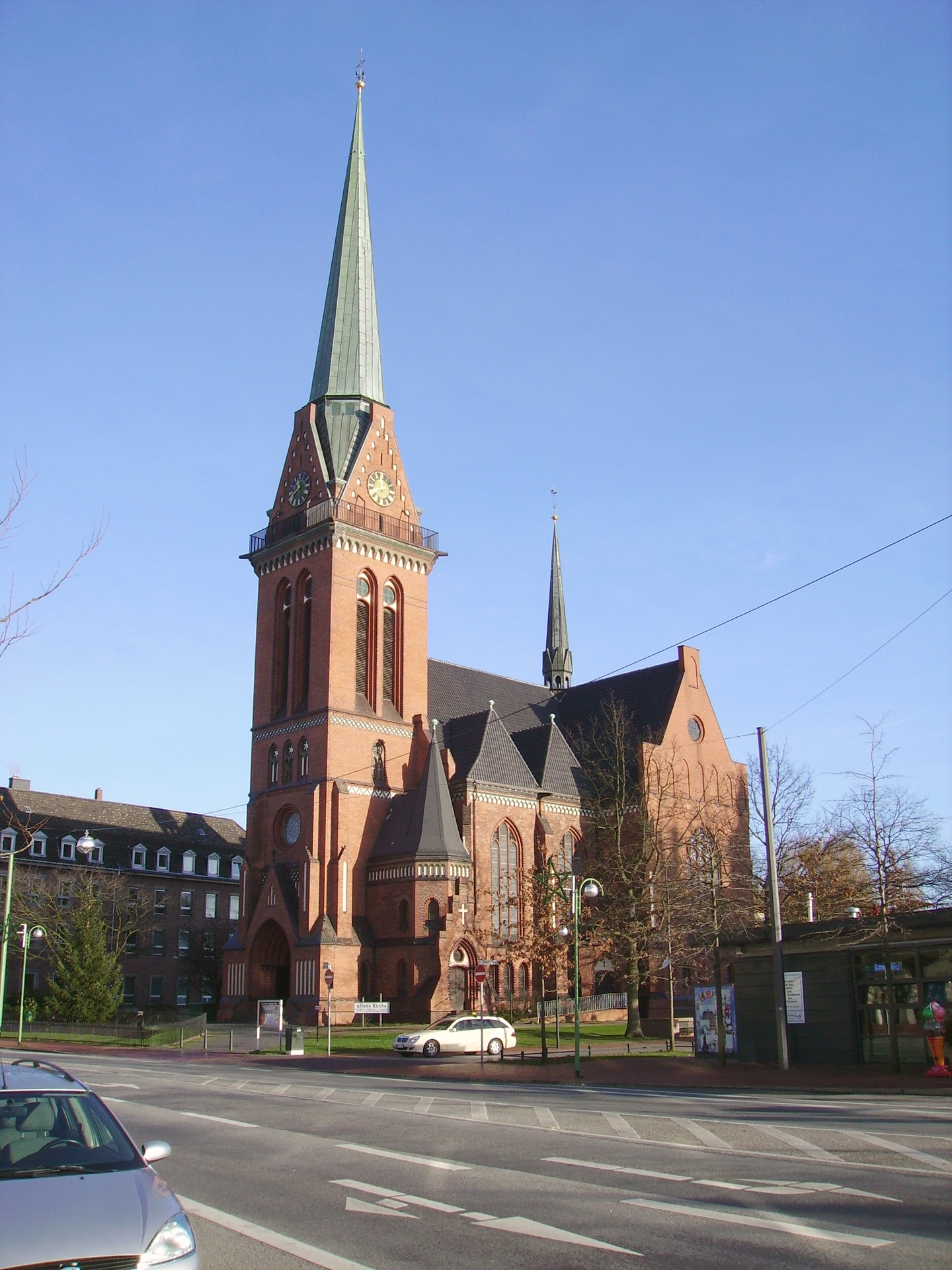 Die 1905 erbaute evangelisch-lutherische Pauluskirche im Stadtteil Lehe von Bremerhaven gehört und dient der Evangelisch-lutherischen Michaelis- und Pauluskirchengemeinde in der Evangelisch-Lutherischen Landeskirche Hannovers. Das abgebildete Objekt ist ein geschütztes Kulturdenkmal in der Freien Hansestadt Bremen, mit der Nr. 1570 beim Landesamt für Denkmalpflege registriert.